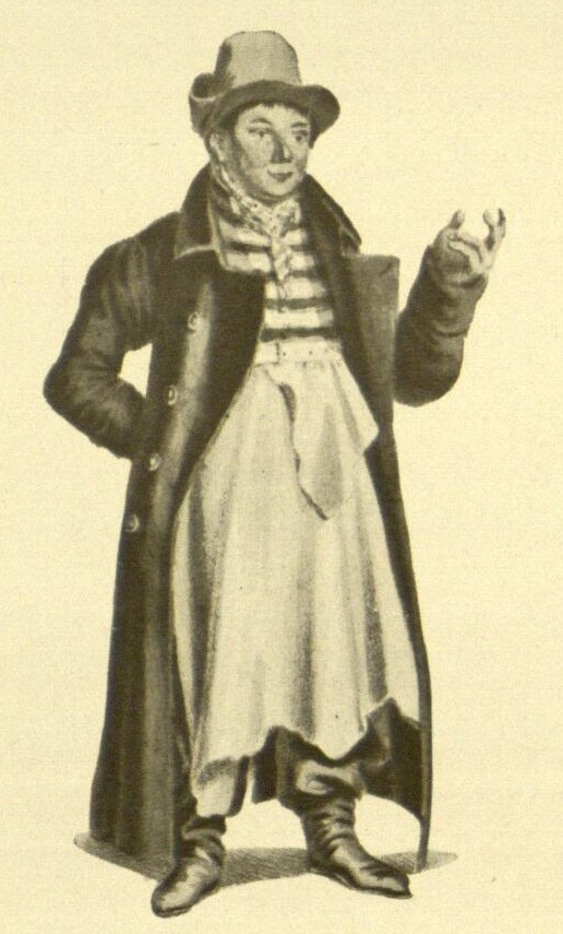 Der Schauspieler Louis Angely 1828 als Kluck in seinem Stück „Das Fest der Handwerker“.